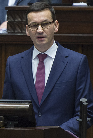 Sala Posiedzeń w Sejmie RP. Prezes Rady Ministrów Mateusz Morawiecki przedstawia program działania Rady Ministrów z wnioskiem o udzielenie jej wotum zaufania.